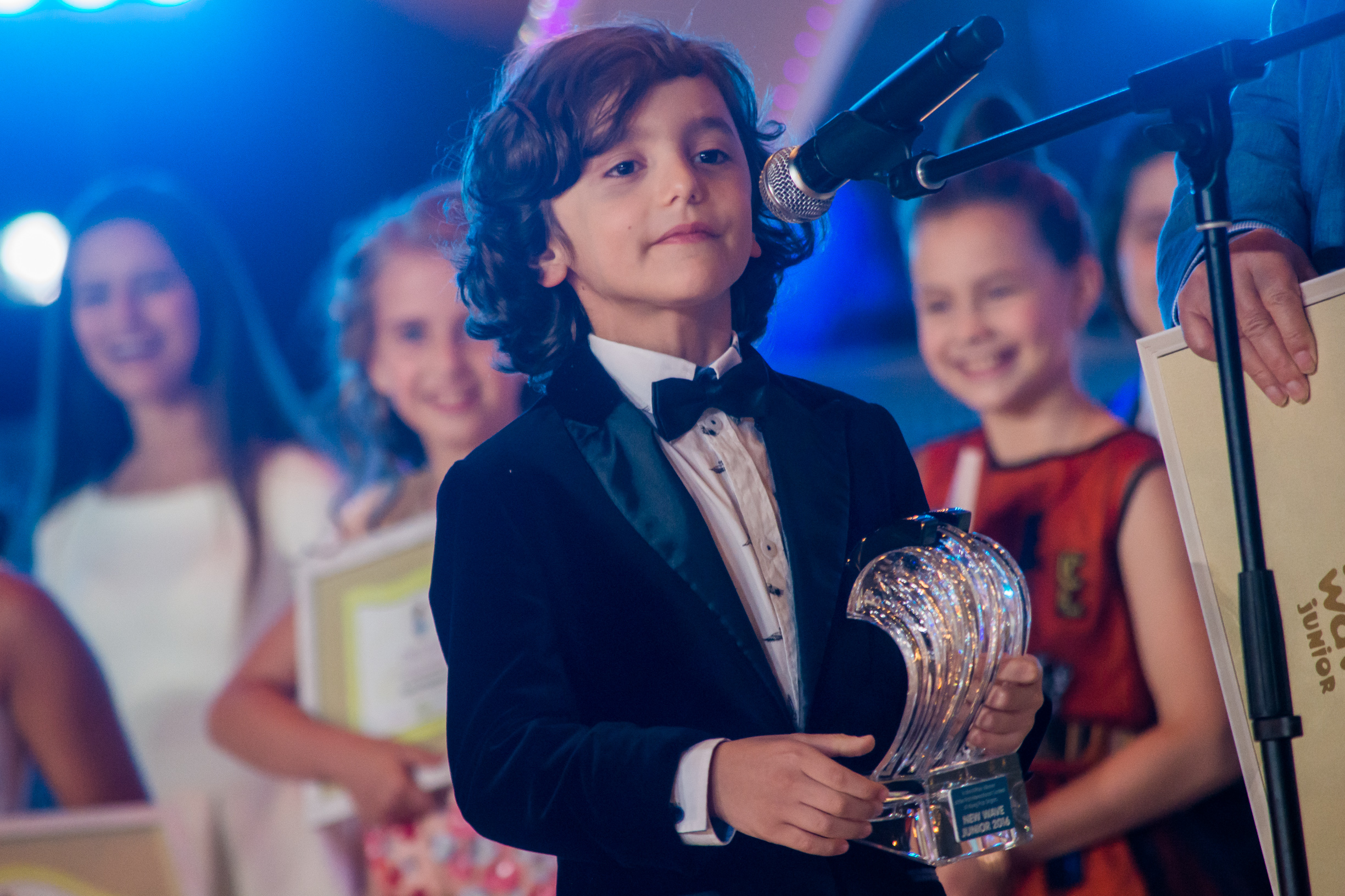 Михаил Григорян, II место на Детской Новой волне 2016